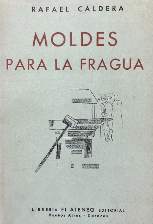 Portada de la primera edición del libro de Rafael Caldera, Moldes para la fragua. Editorial El Ateneo, Buenos Aires.